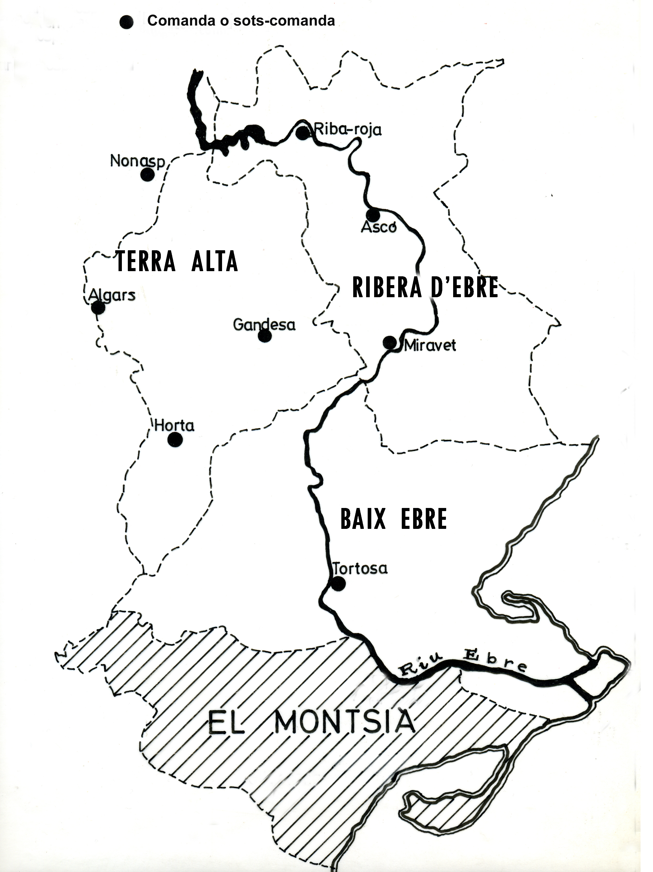 Les comandes del Temple a les terres de l'Ebre català (El "districte de Ribera"), (Dib. J. Fuguet, 2002)